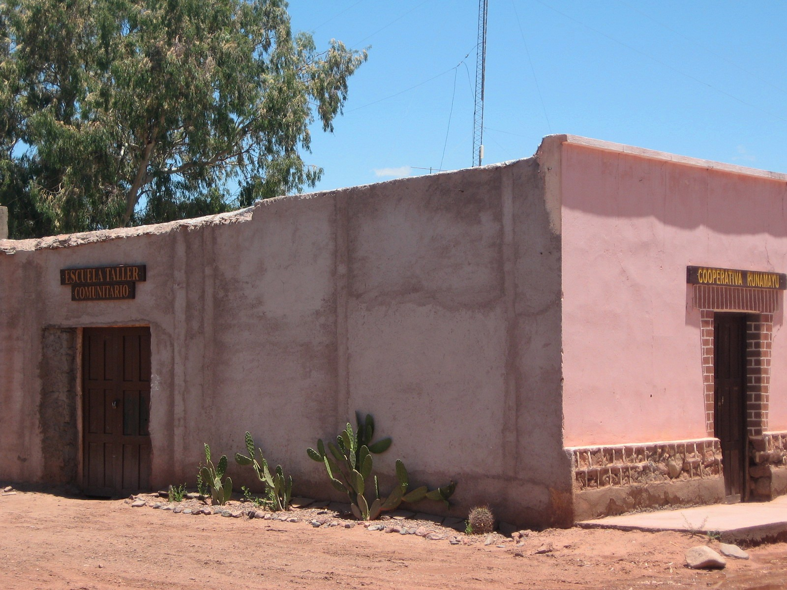 Cooperativa y Escuela Taller comunitario en la localidad de Banda Florida, en cercanías de Villa Unión, provincia de La Rioja